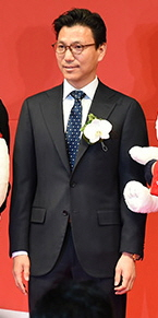 제19회 코카-콜라 체육대상 : 제1부